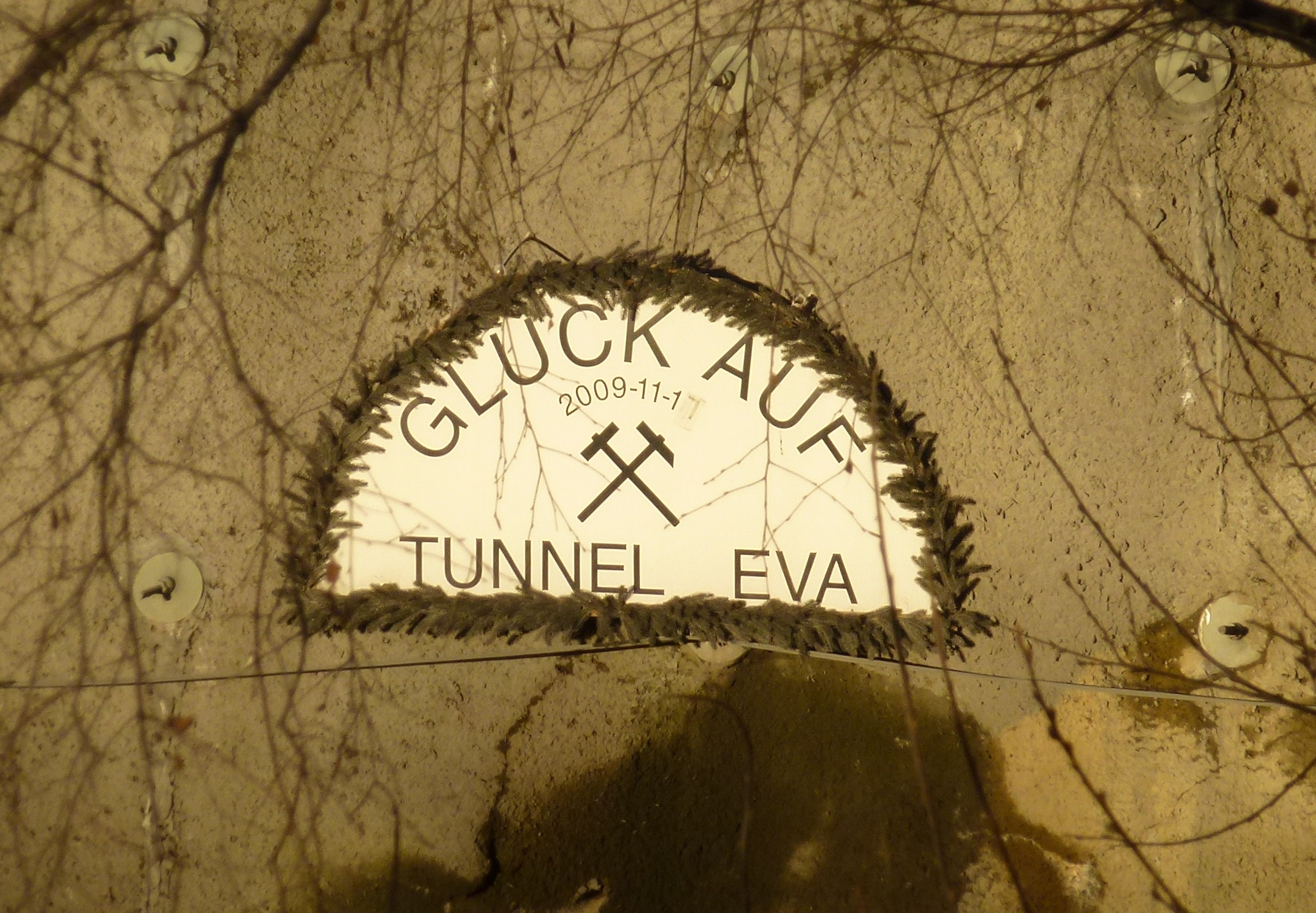 "Glück auf" Tunnel Eva (Vasatunnelns arbetstunnel)